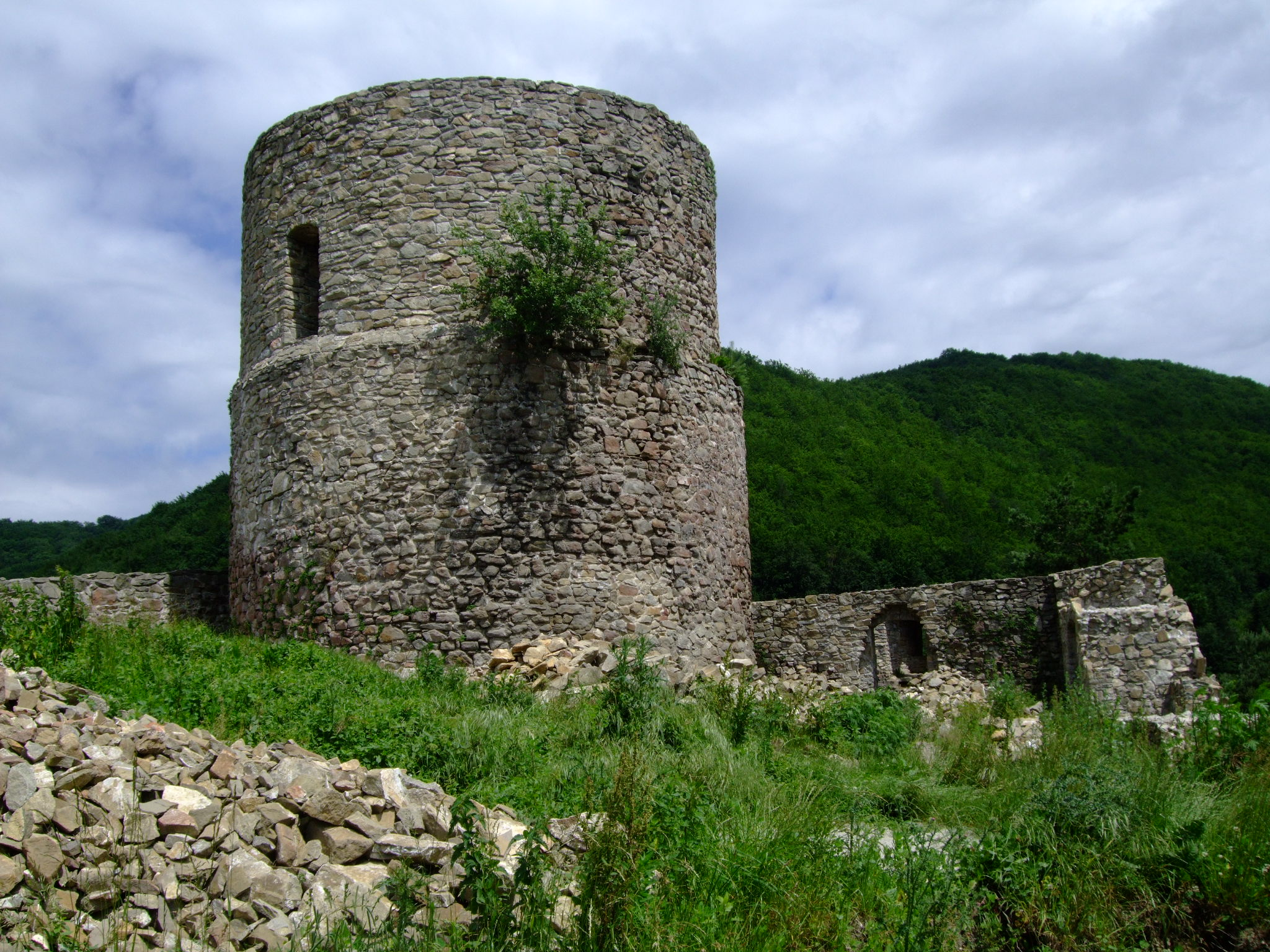 Zamek Rytro.